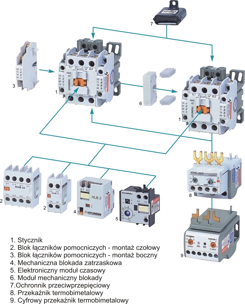 Stycznik wraz z przykładowymi akcesoriami.